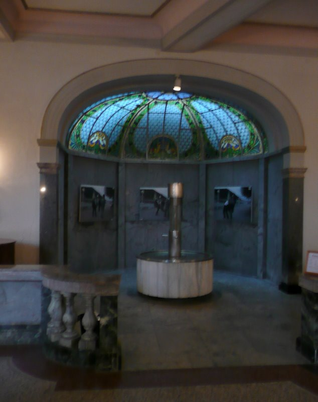 Fountain Emser Kränchen, Bad Ems, Brunnenhalle. Temperature: 44° C.